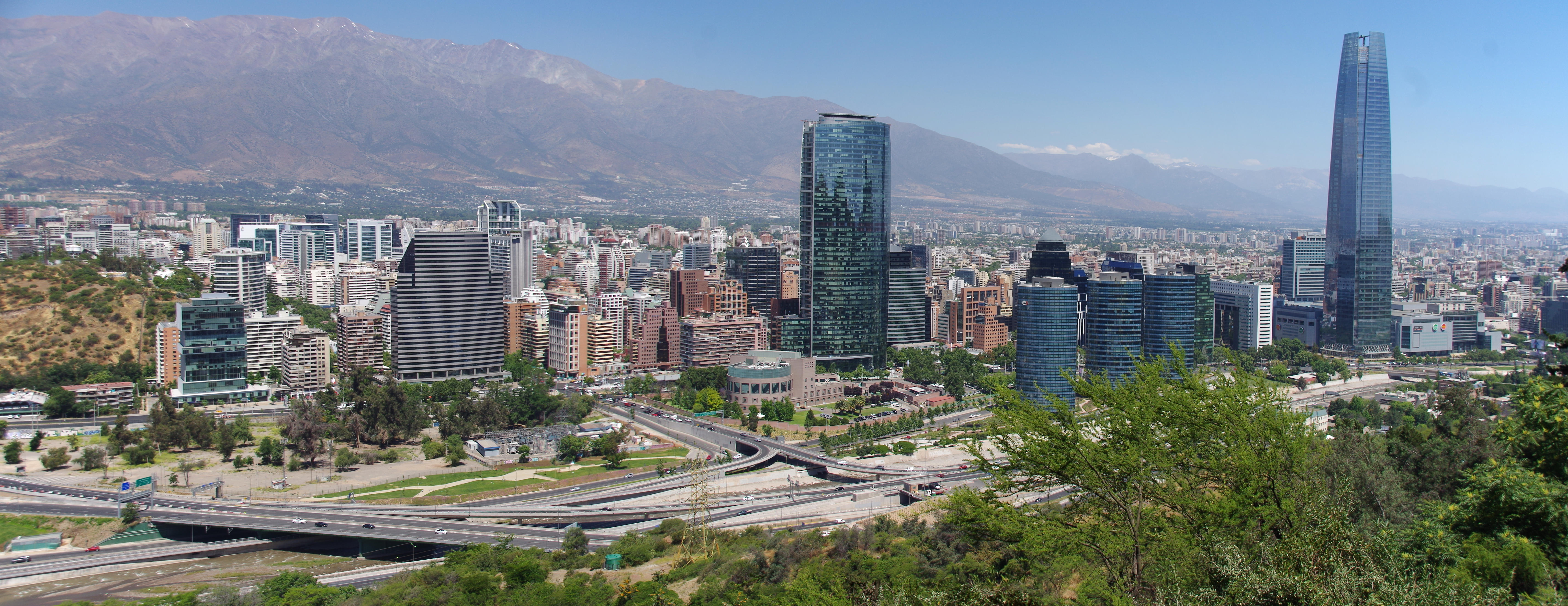 Santiago de Chile, Panorama vom Cerro San Cristobal